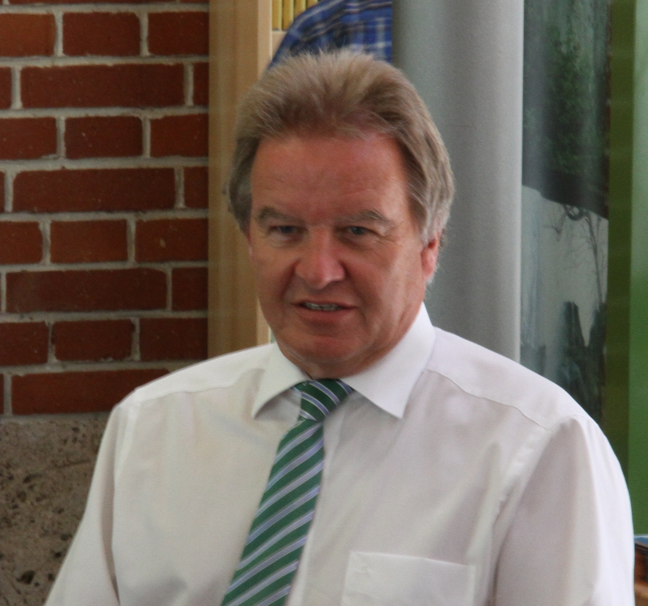 Franz Untersteller während eines Besuchs im Biosphärengebiet Schwäbische Alb am 13.06.2015.[1]